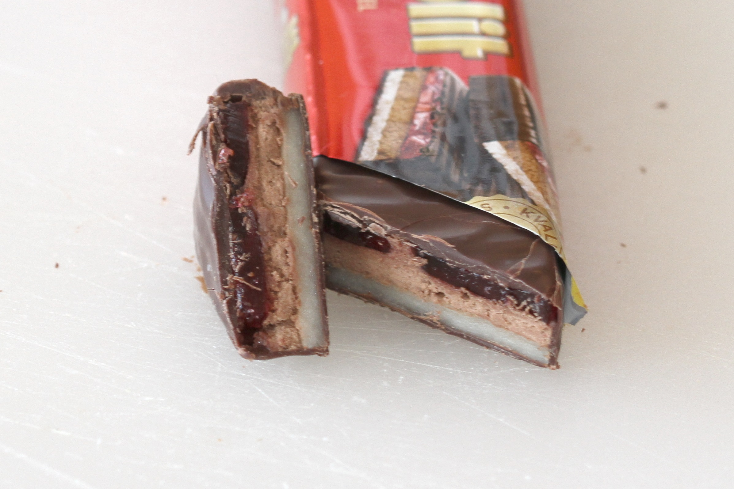 Sjokoladen Monolit.